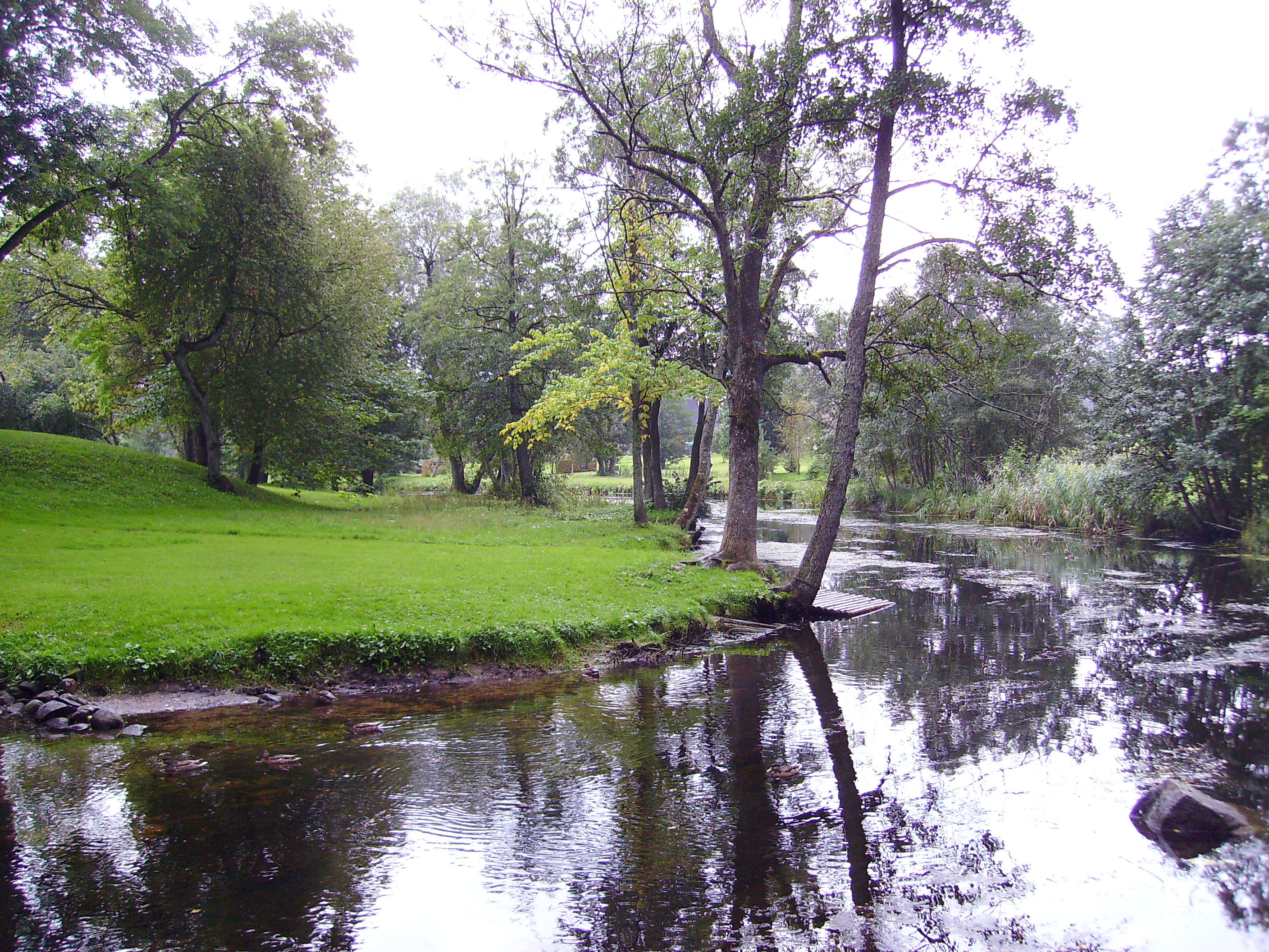 Amme jõgi Palamuses 3